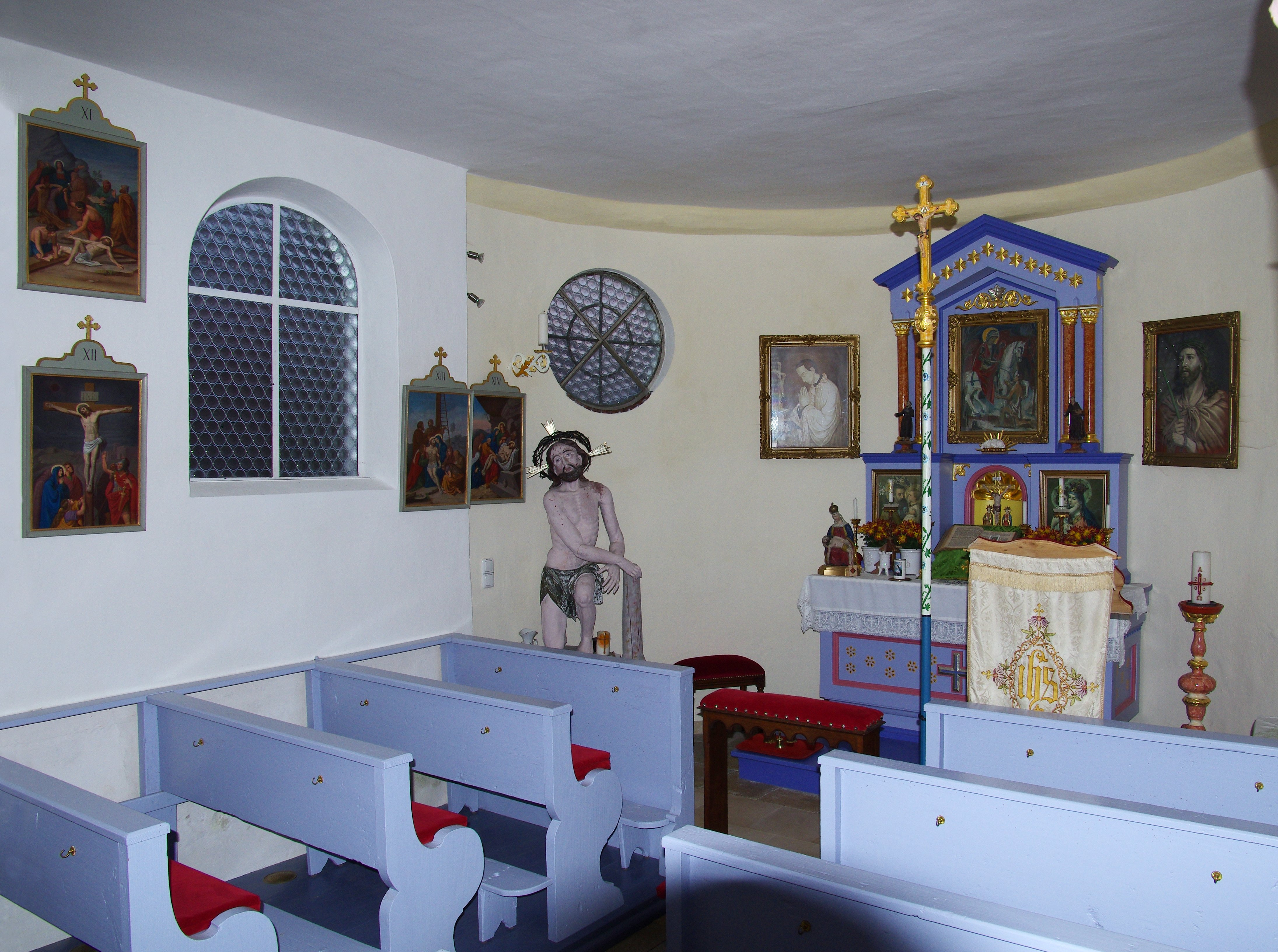 Die Kapelle St. Martin auch zum gegeißelten Heiland